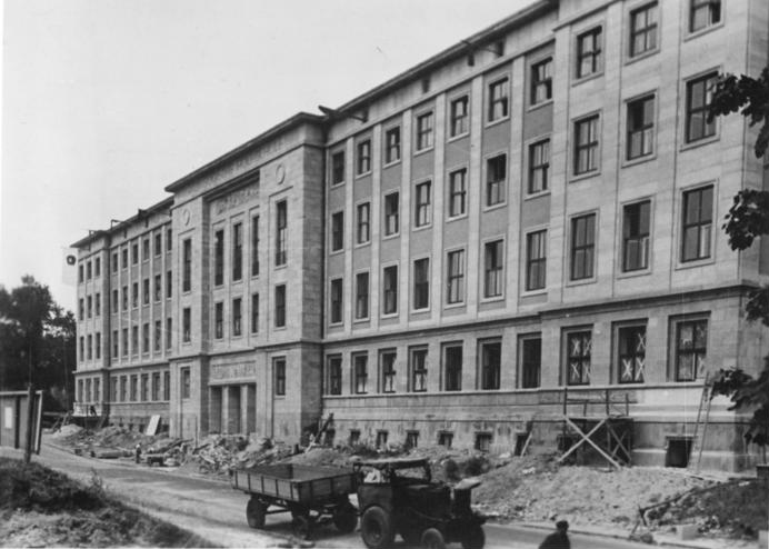 Dresden, Pädagogische Hochschule im Bau Zentralbild Höhne-Pohl 23.10.1952 Die neue Pädagogische Hochschule in Dresden. In der neuen Pädagogischen Hochschule in Dresden werden 750 junge Menschen auf den schönen und verantwortungsvollen Beruf des Lehrers vorbereitet. UBz: Das neuerbaute Gebäude der Pädagogischen Hochschule in Dresden.